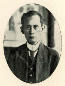 Bân-lâm-gú: Tō͘ Chheng 杜清